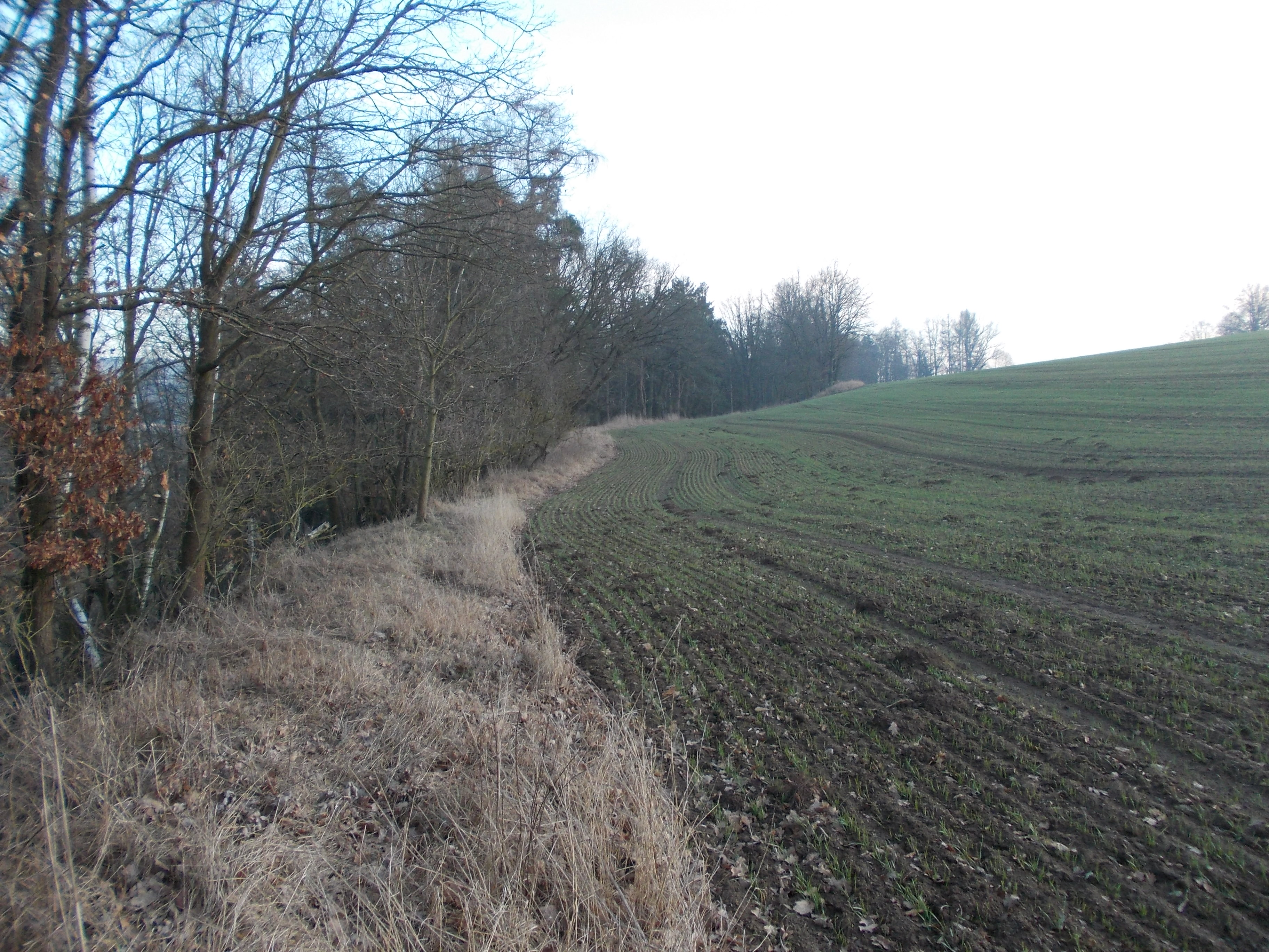 Pohled, který se naskytne tomu, kdo přichází k halštatskému a raně středověkému hradišti jménem "Hradec u Němětic", zhruba ve směru od jihozápadu.